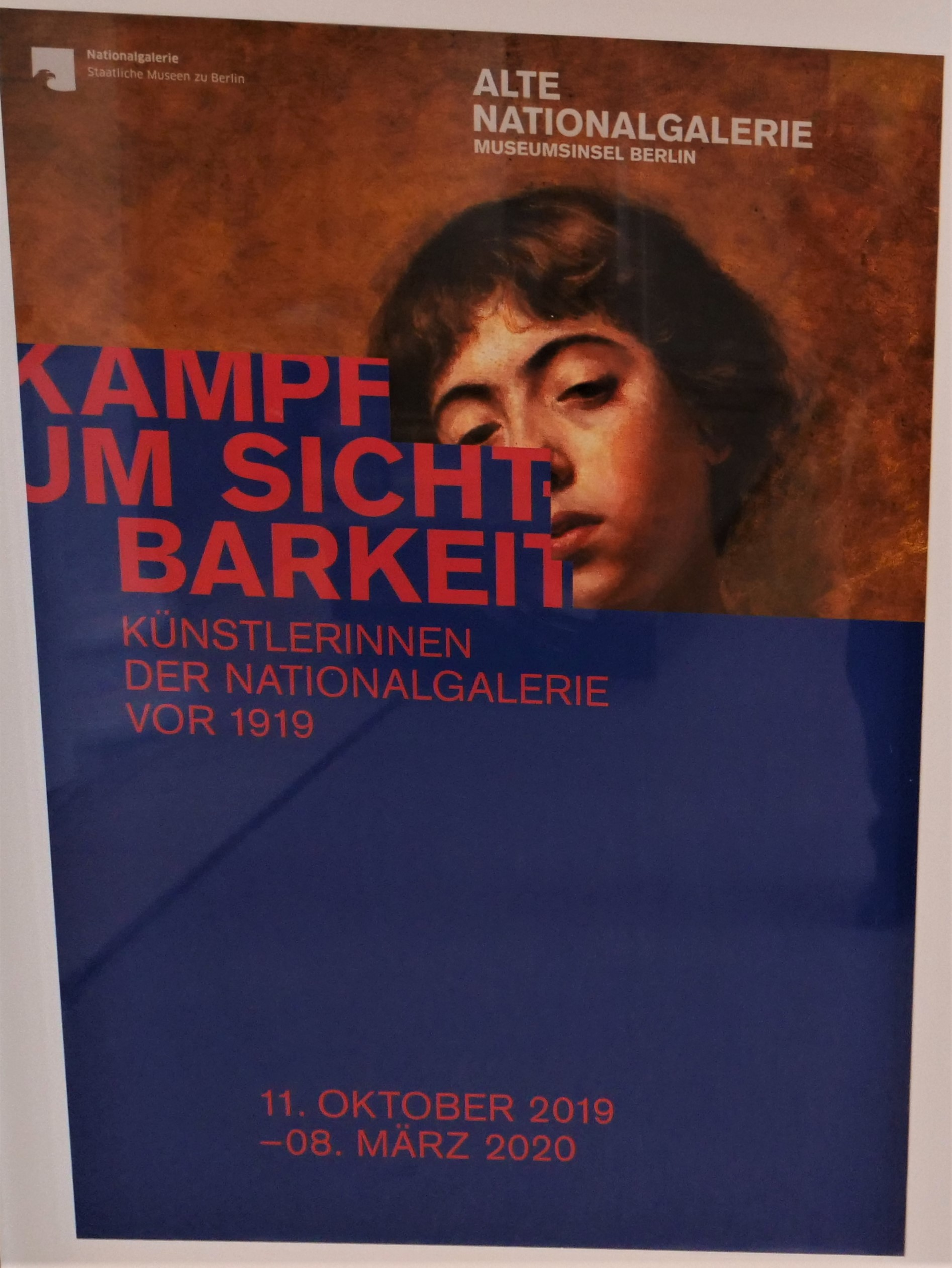 Ausstellungsplakat Kampf um Sichtbarkeit, Ausstellung vom 11. Oktober 2019 bis 8. März 2020 in der Alten Nationalgalerie